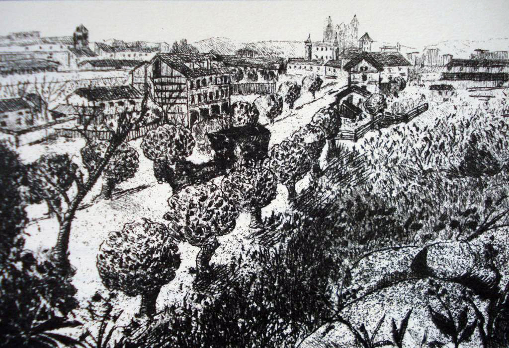 Grabado de principios del siglo XX del paseo de las negrillas, hoy Ordoño II, en la capital leonesa.